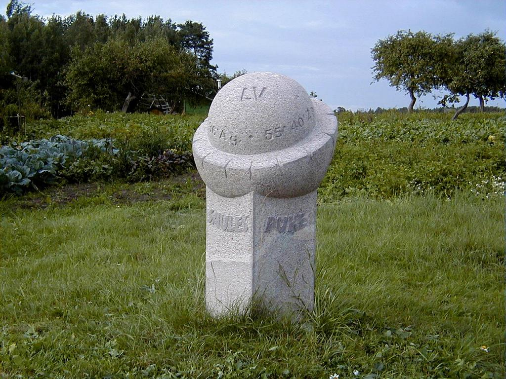 Demenes apkārtne, Latvijas D zīme "Saules puķe" 2001-08-11